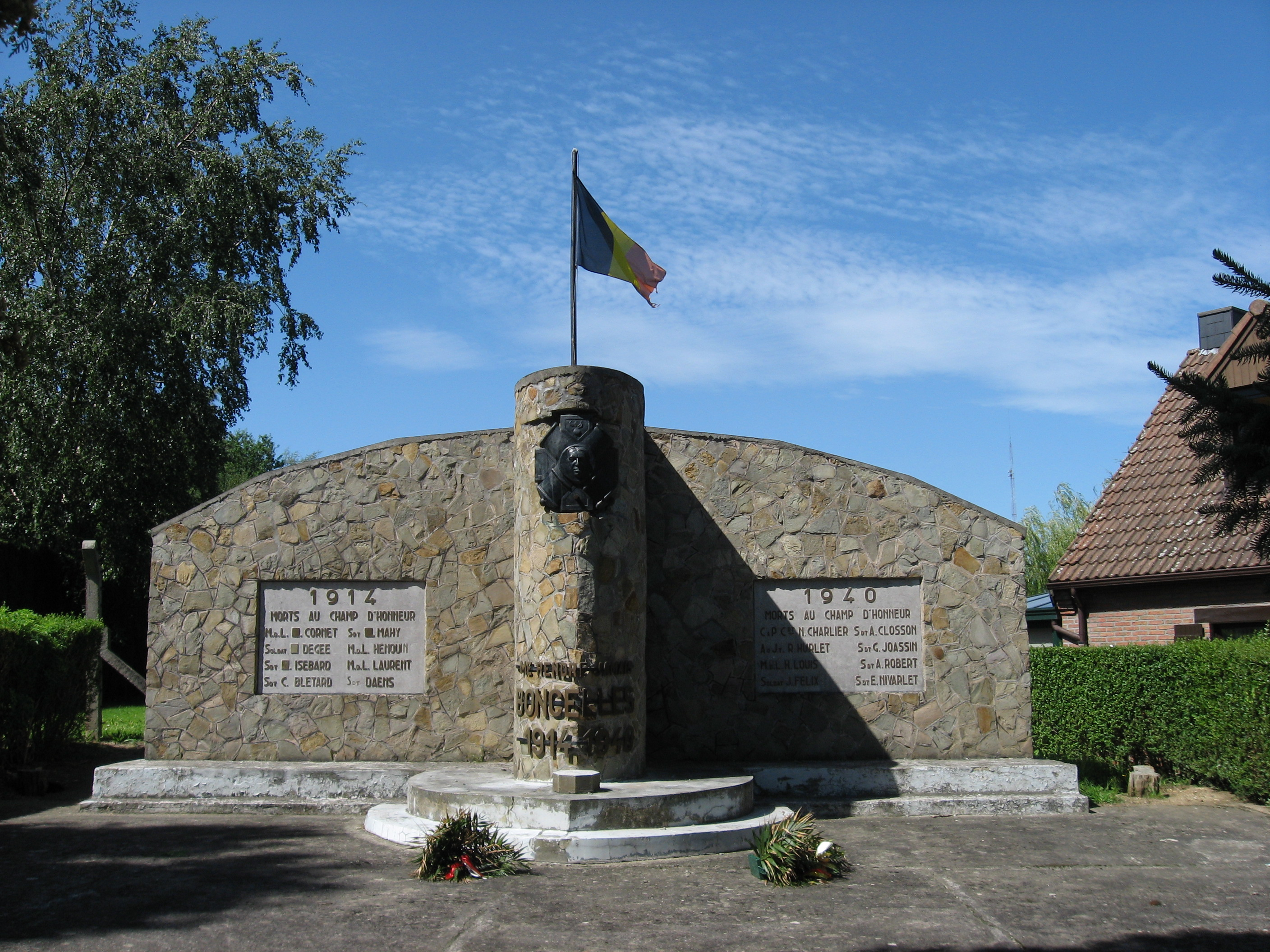 Monument sur lequel est inscrit "Me rendre? Jamais!" prononcé par le commandant Charlier